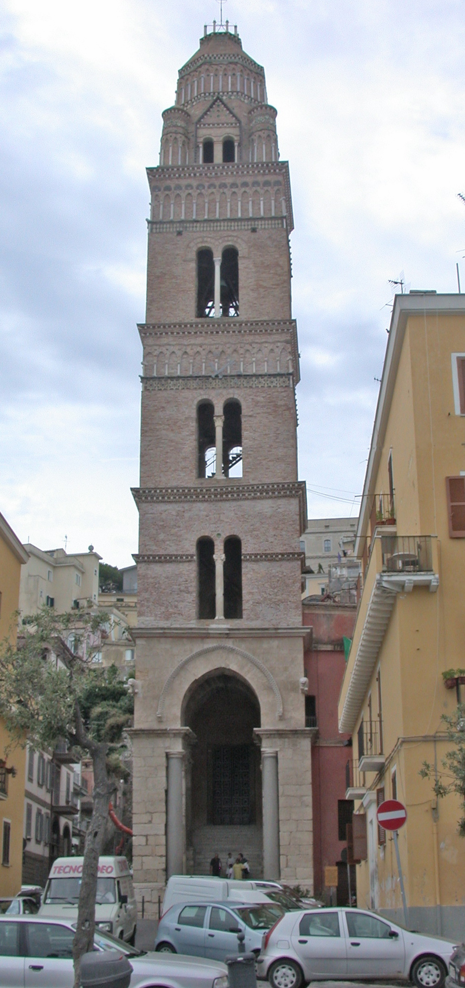 Gaeta (provincia di Latina, Lazio, Italia), campanile del duomo di Sant'Erasmo.